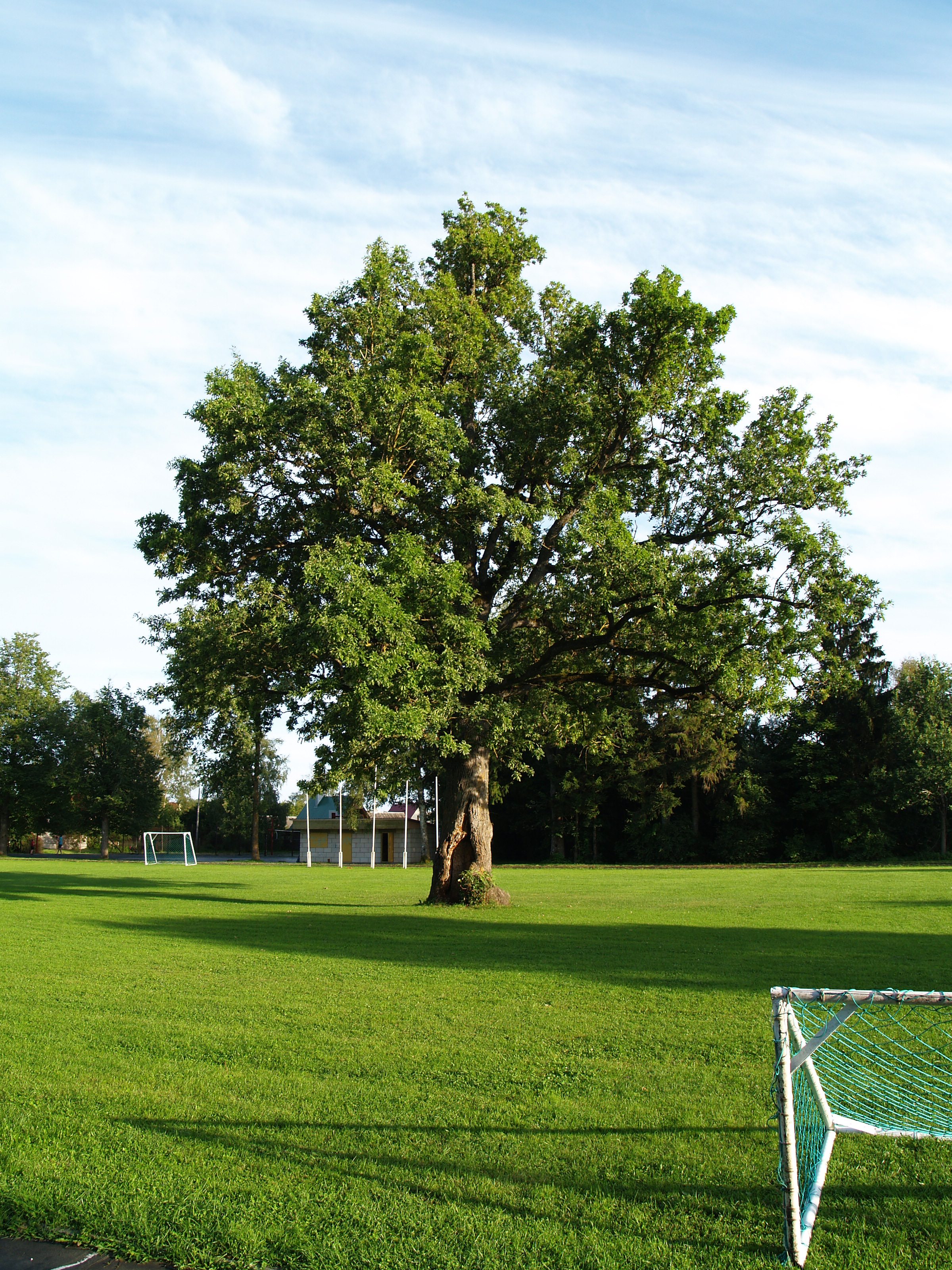 Orissaare staadioni tamm